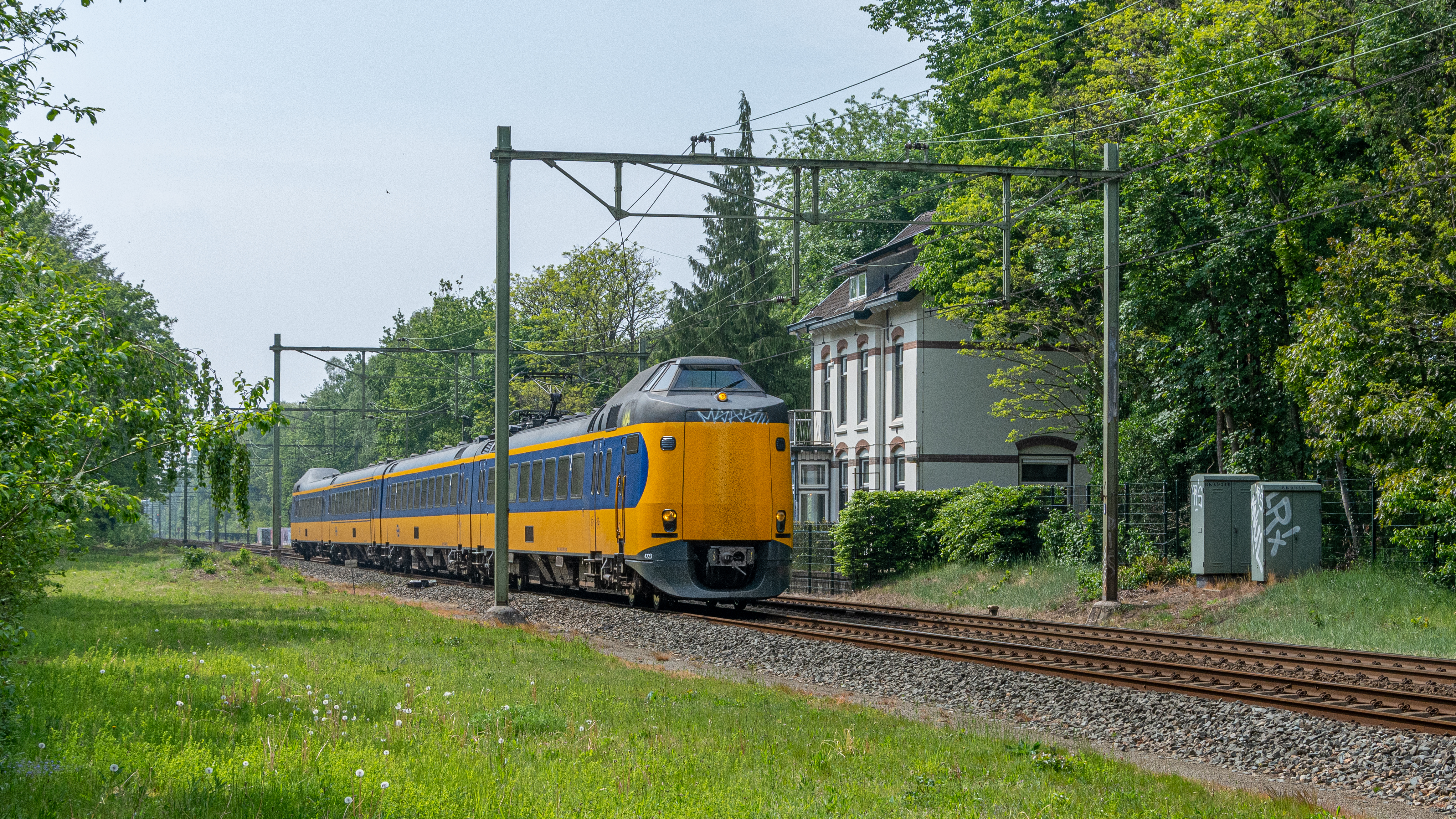 Voorbij voormalig station Soestduinen rijdt ICMm 4243 als IC 1755 Den Haag Centraal - Enschede. Het oude station is een gemeentelijk monument aan de Centraalspoorweg in de gemeente Soest ter hoogte van de buurtschap Soestduinen.